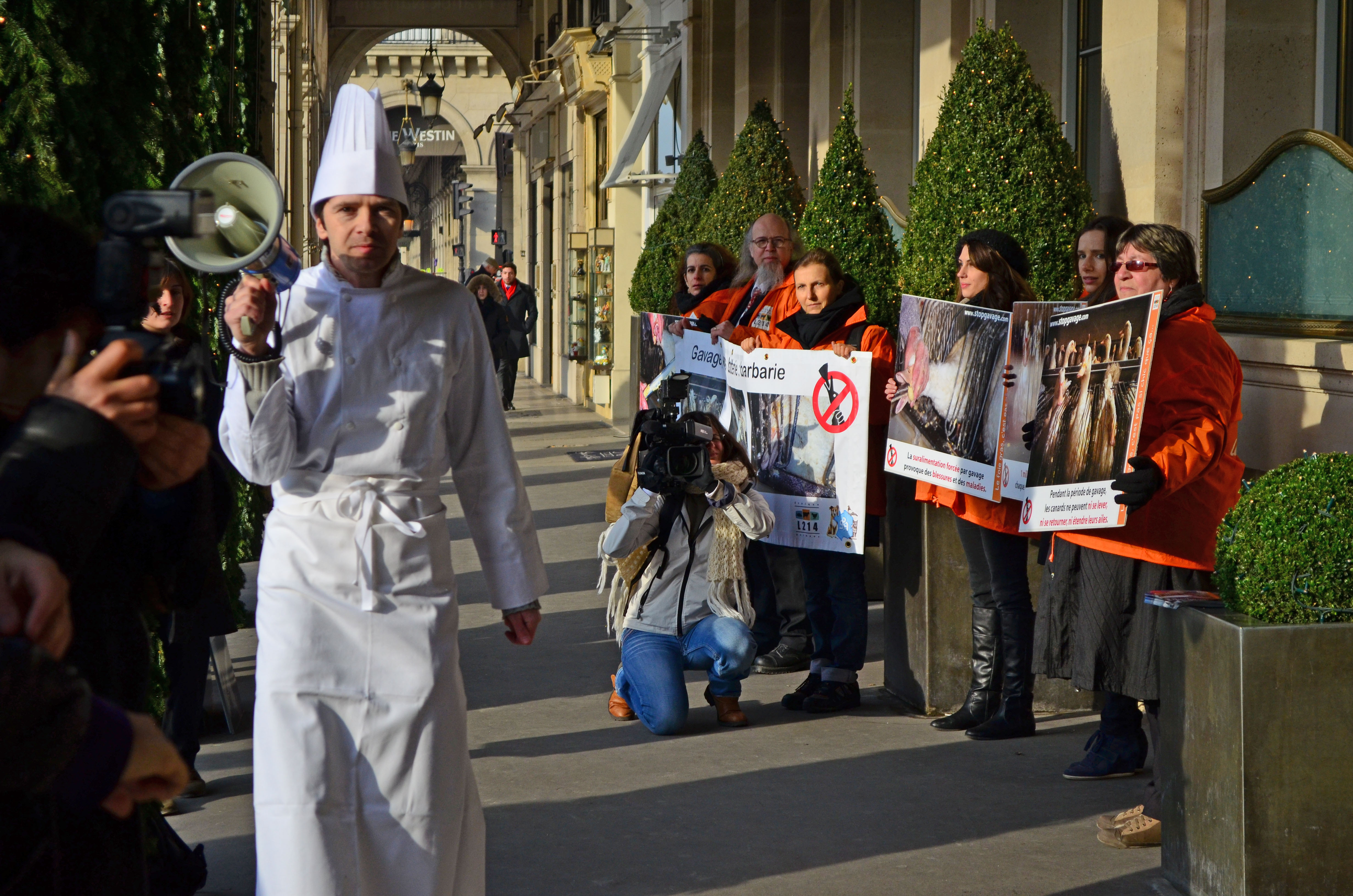 Le jeudi 12 décembre, des militants de L214 Ethique et animaux ont manifesté devant l'hôtel Meurice pour sensibiliser à la souffrance animale engendrée par la production de foie gras, et interpeller le chef du Meurice, Alain Ducasse, sur cette question.